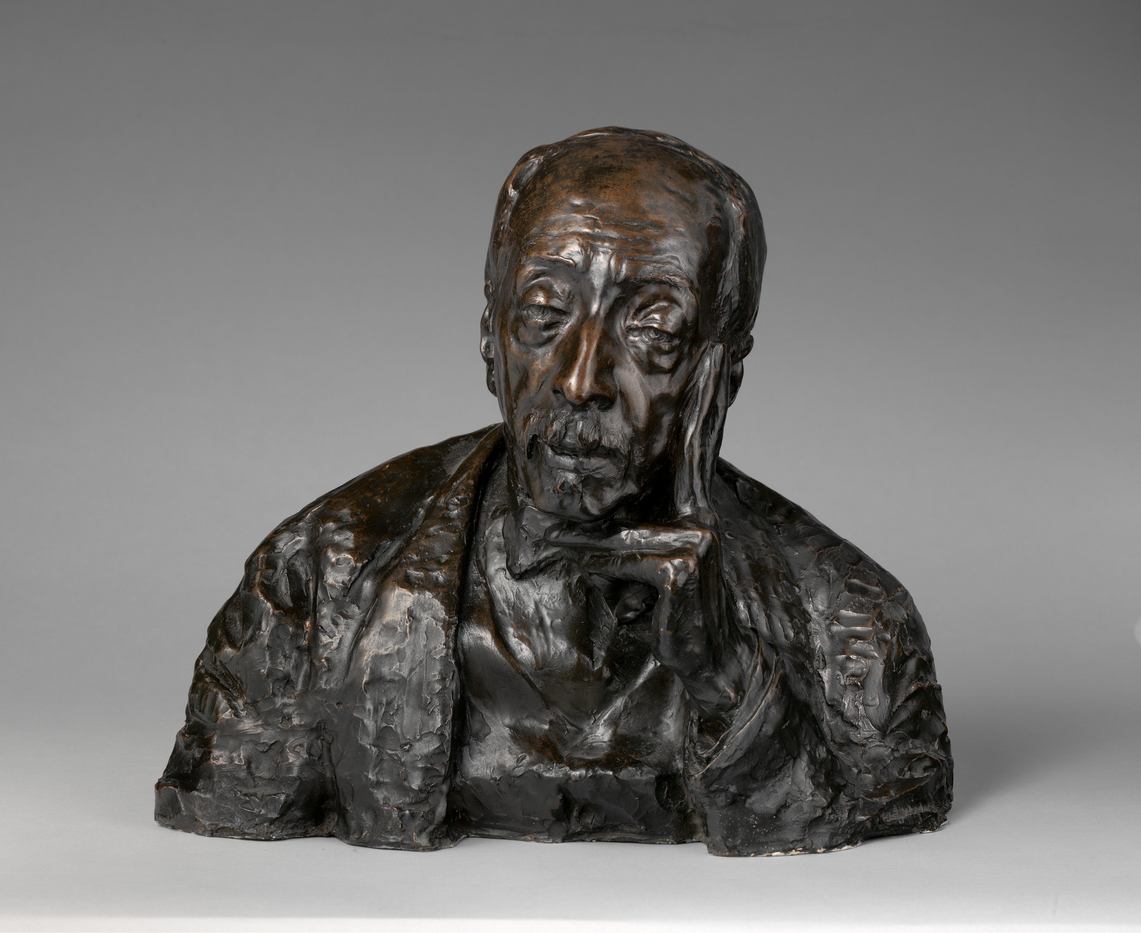 Bust; Sculpture